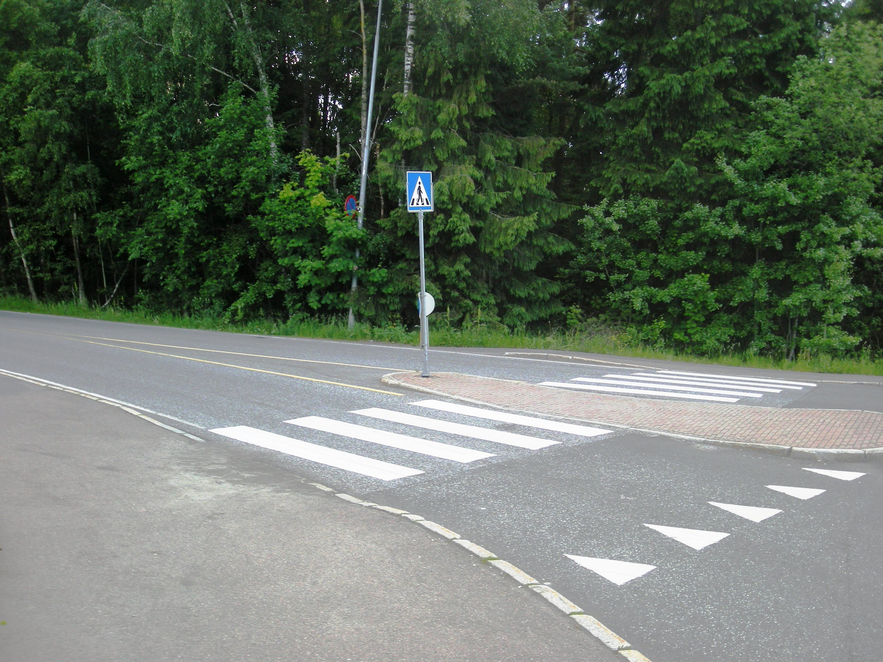 Nordenden av Lofsrudveien mot Mortensrudveien